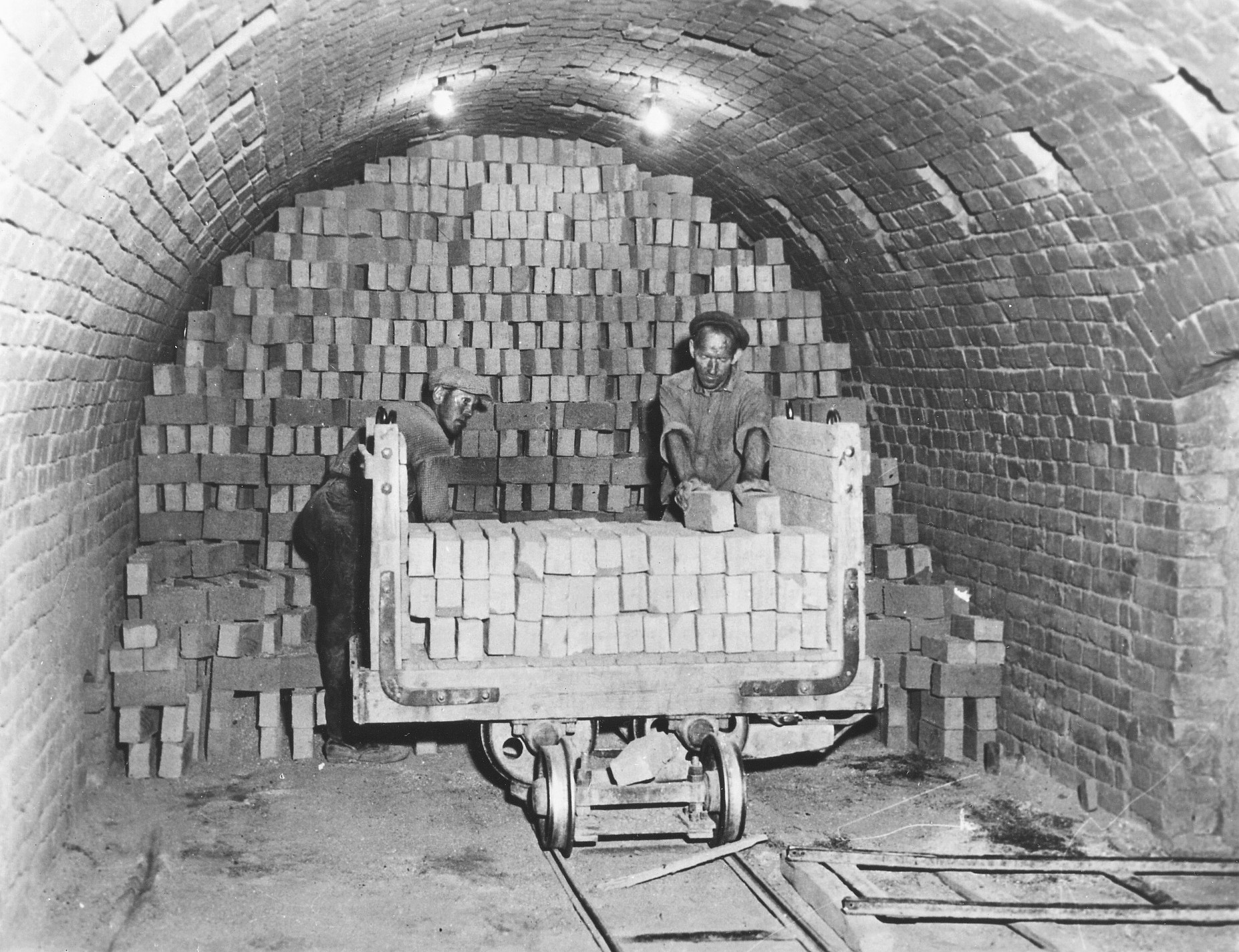 Fittja tegelbruks tegelugn